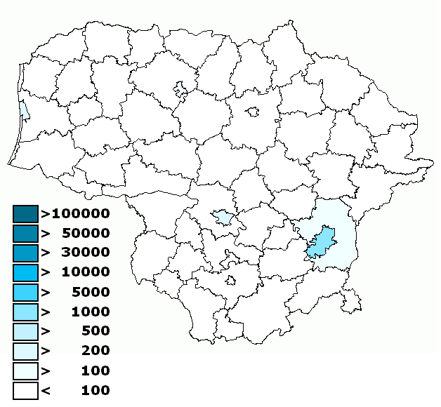 Žydų mažuma pagal savivaldybes